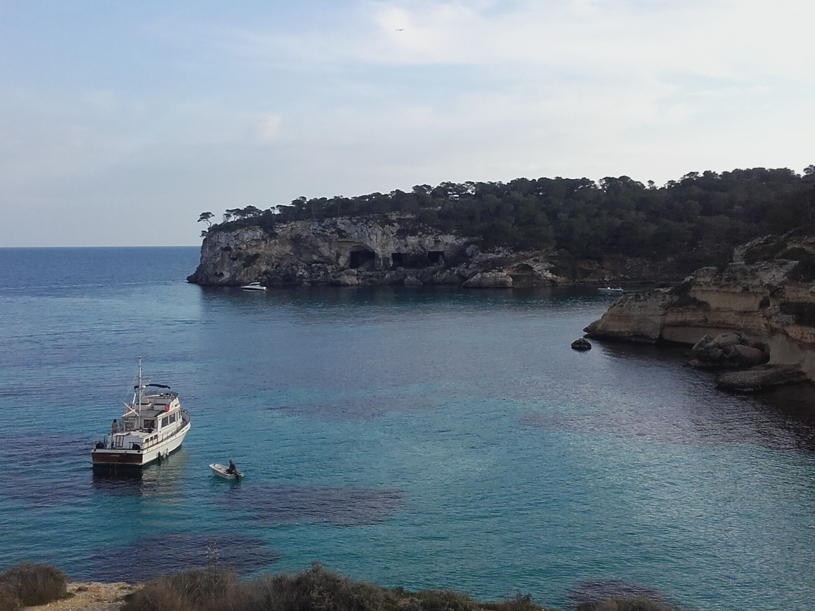 Vista panorámica de la bahía de Portals Vells, en el municipio de Calviá, Mallorca.